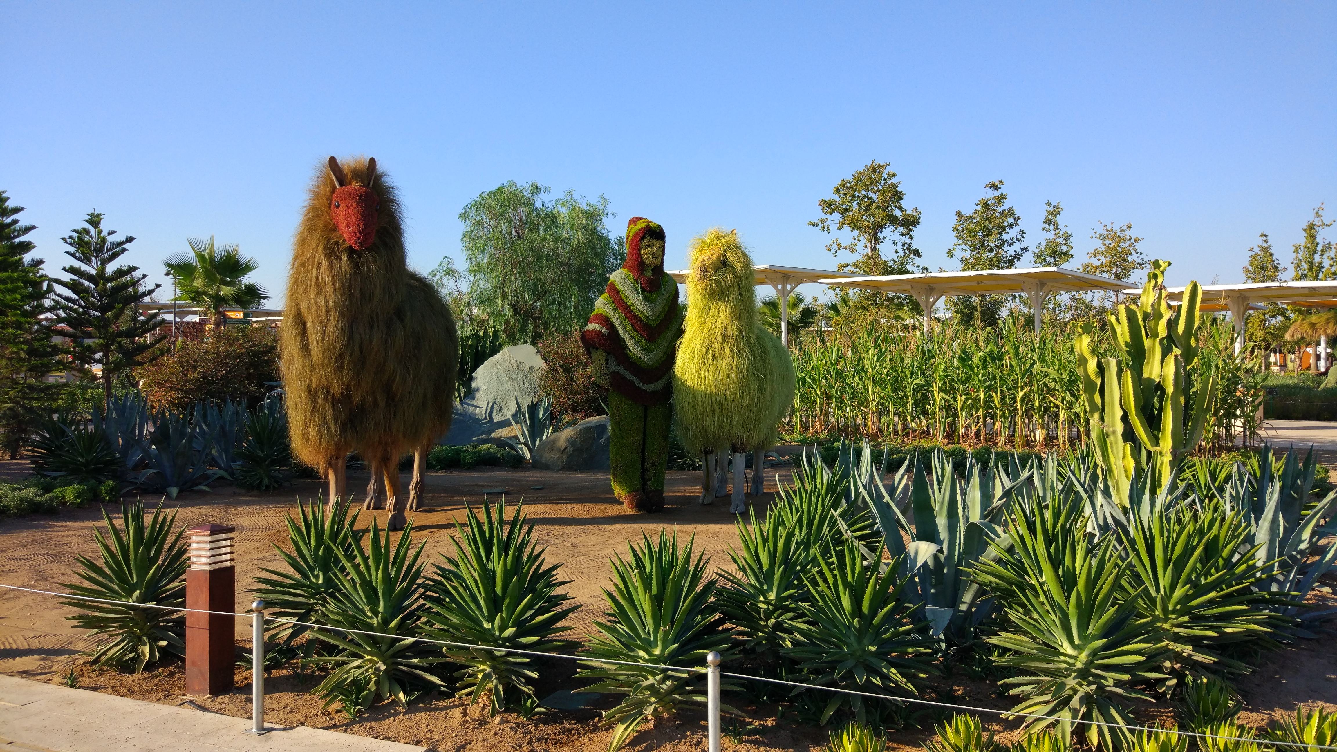 Mozaik Kültür Bitki Heykelleri Alanı'nından örnek lama ve insan heykeli.